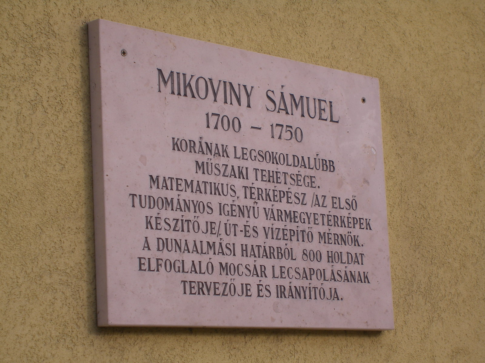 Dunaalmás - Mikoviny Sámuel emléktáblája